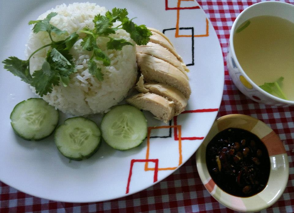 မြန်မာဘာသာ: ကြက်ဆီထမင်း